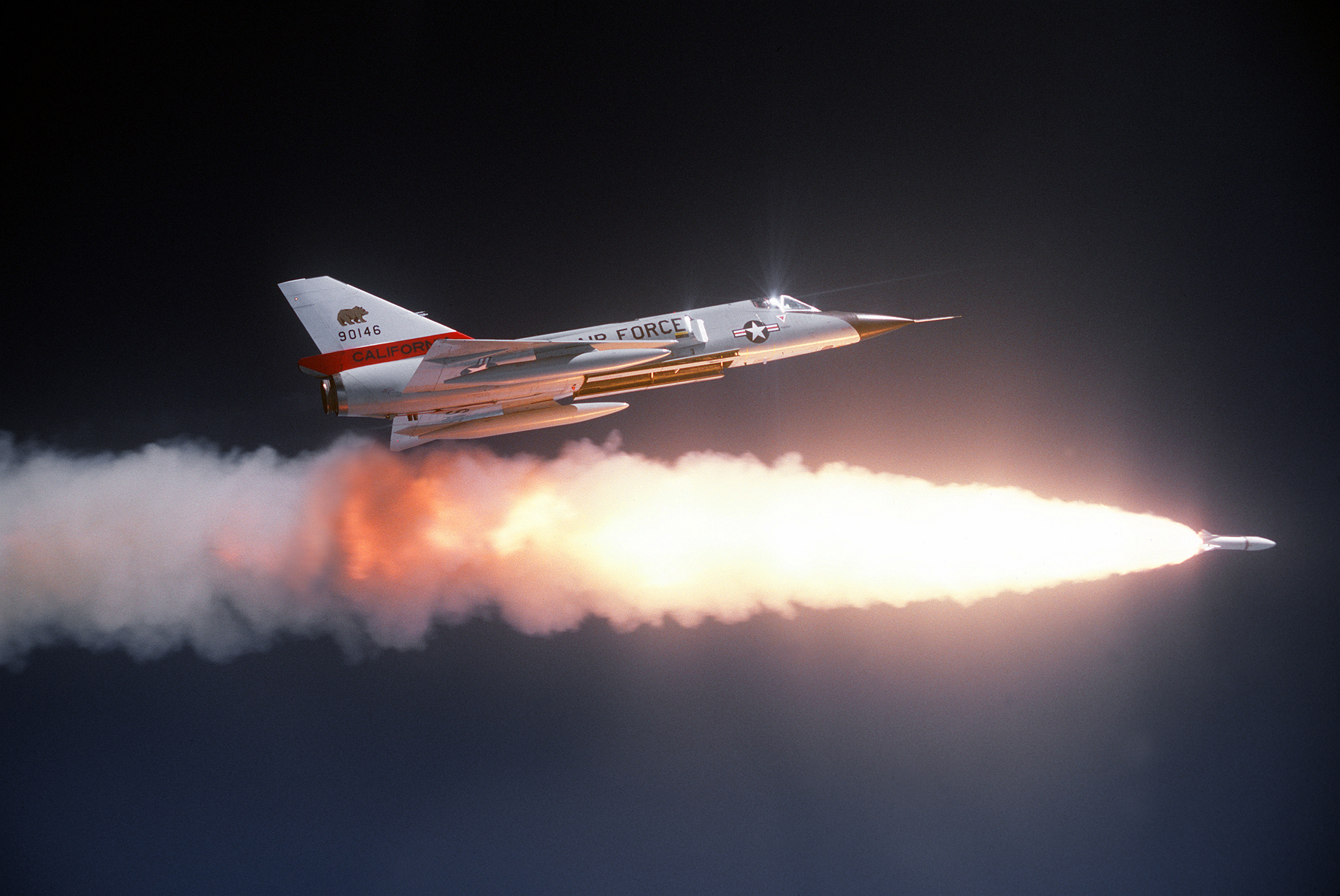 Convair F-106A Delta Dart firing Genie missile